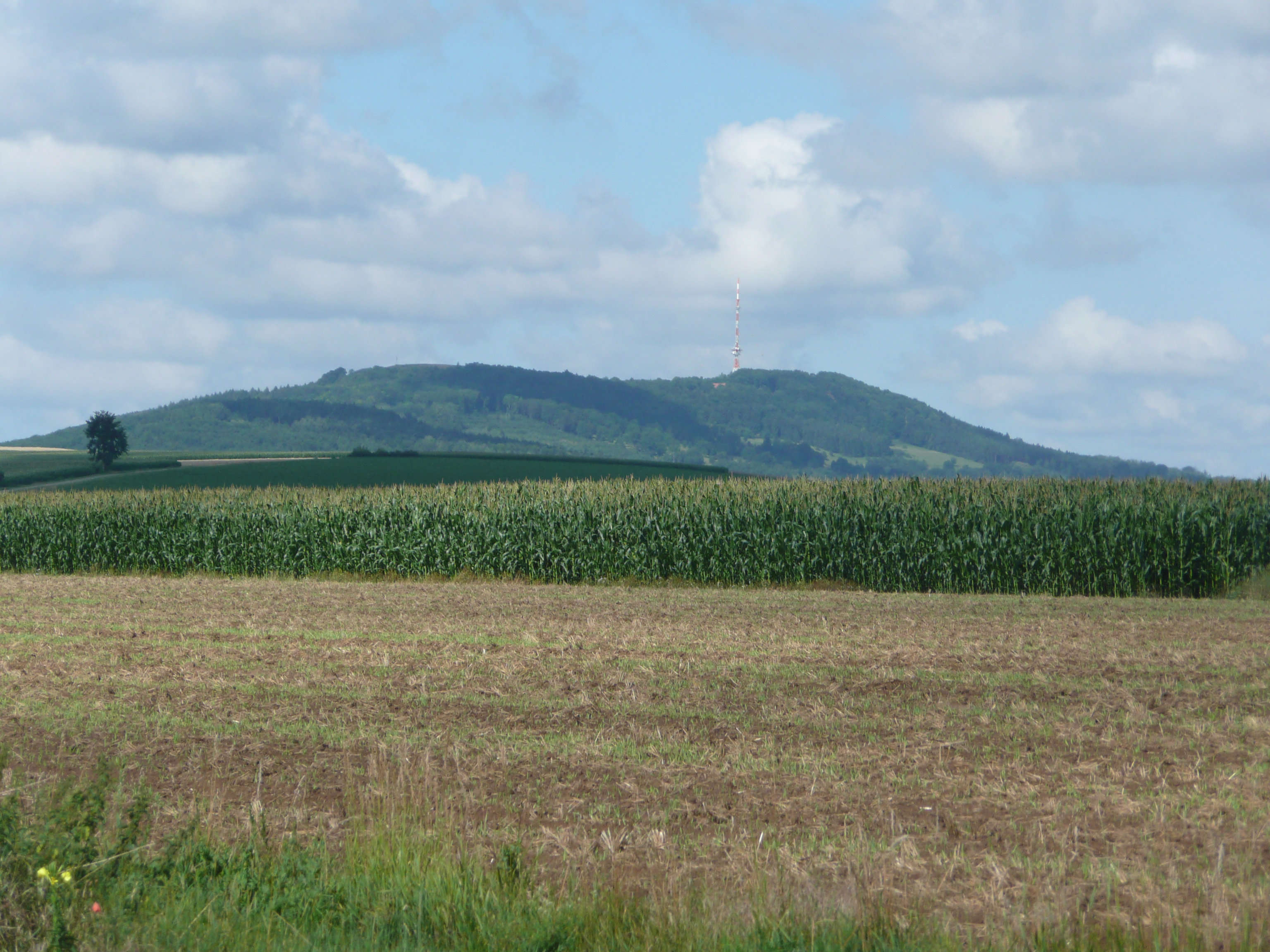 Blick auf den Hesselberg